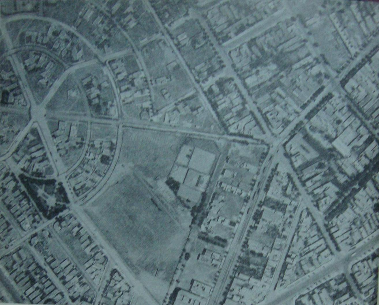 Vista a vuelo de pájaro del barrio de Parque Chas, urbanización creada en el año 1925. Puede verse que al momento de tomarse la fotografía no estaban abiertas todas sus calles, y menos aún estaba edificado.